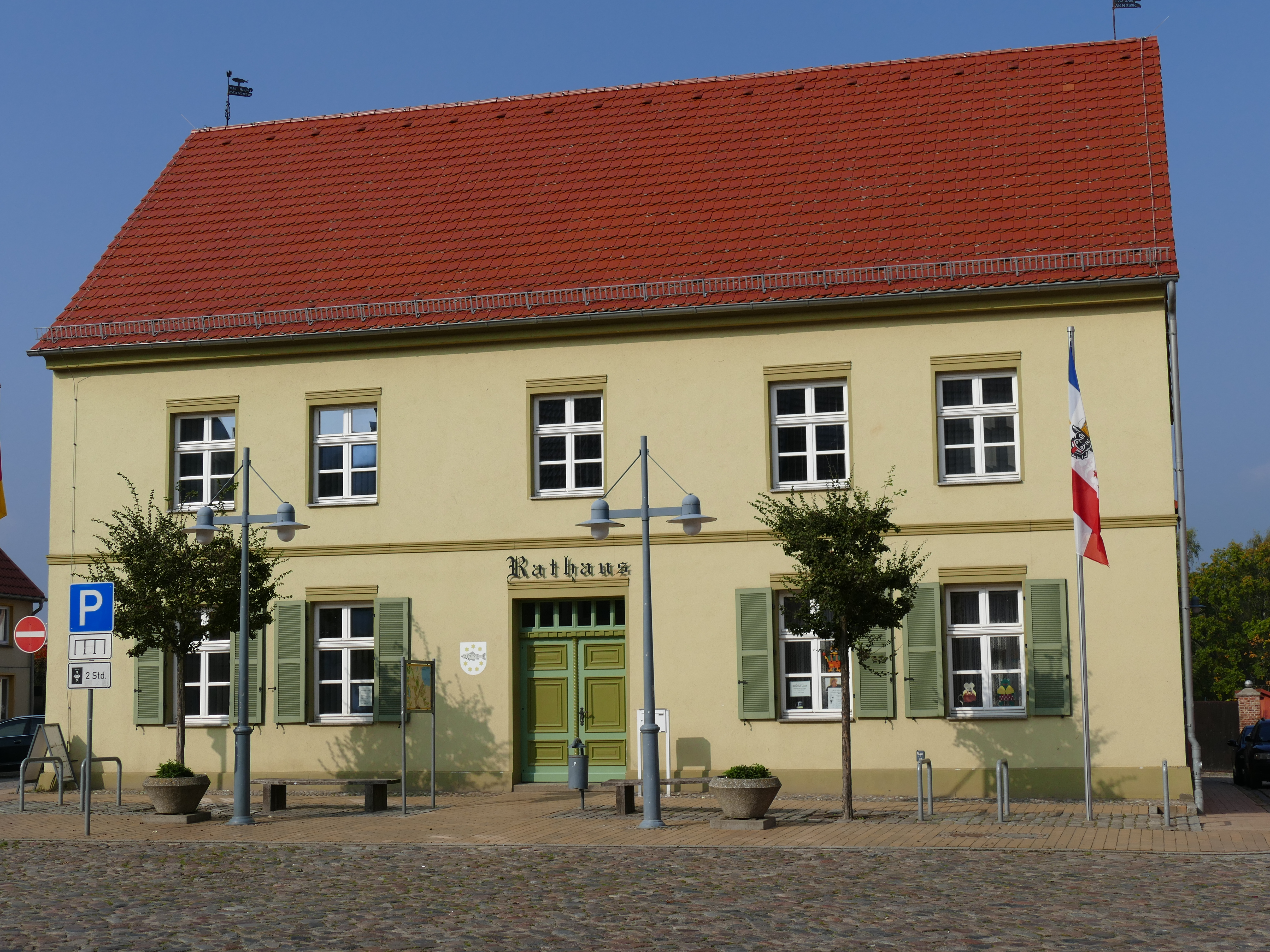 Lassan, Rathaus